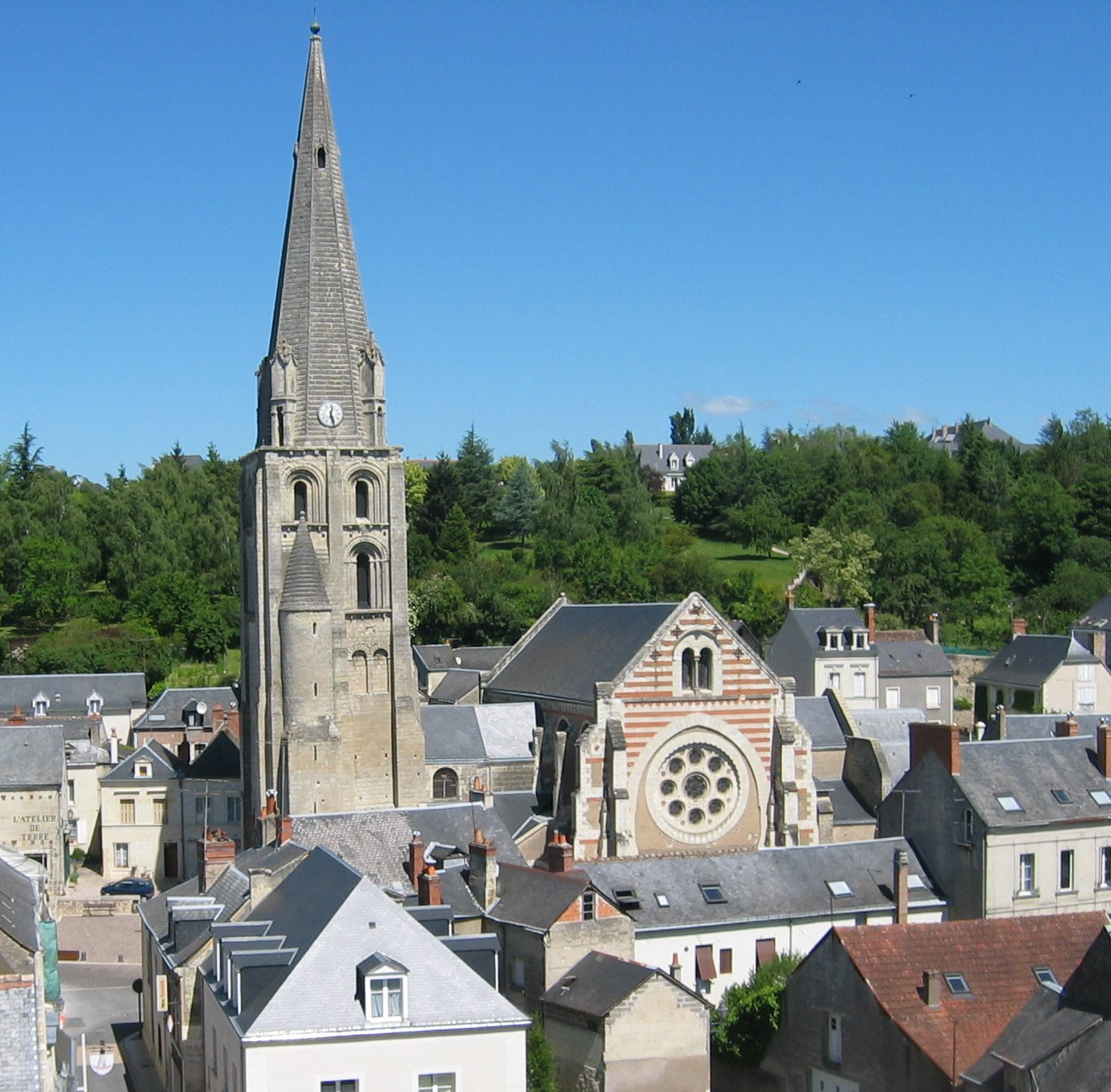 Église paroissiale Saint-Jean-Baptiste de Langeais, vue depuis le château .